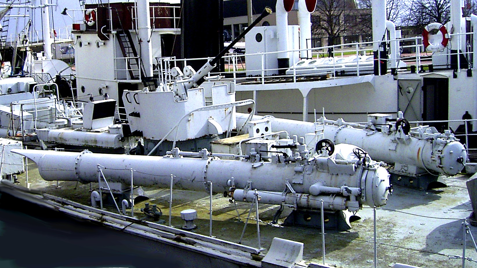 Torpedorohre und 4 cm Flak auf dem Achterschiff des S-Bootes "Kranich" (Jaguar-Klasse) im Schiffahrtmuseum Bremerhaven. Die 40/70 Bofors Flak in offenem Geschützstand wurde während des Marsches mit einer Persenning abgedeckt und mit der Mündung nach vorne (also andersherum als hier abgebildet) gefahren. Die Druckluftgetriebenen Torpedorohre warfen die Torpedos 15° seitlich gegen die Fahrtrichtung aus (vorne 10°). Mit Hilfe einer schwenkbaren Winde auf dem Heck und Umlenkrollen konnten die Torpedos aus den Rohren gezogen werden bzw. die Rohre nachgeladen werden.